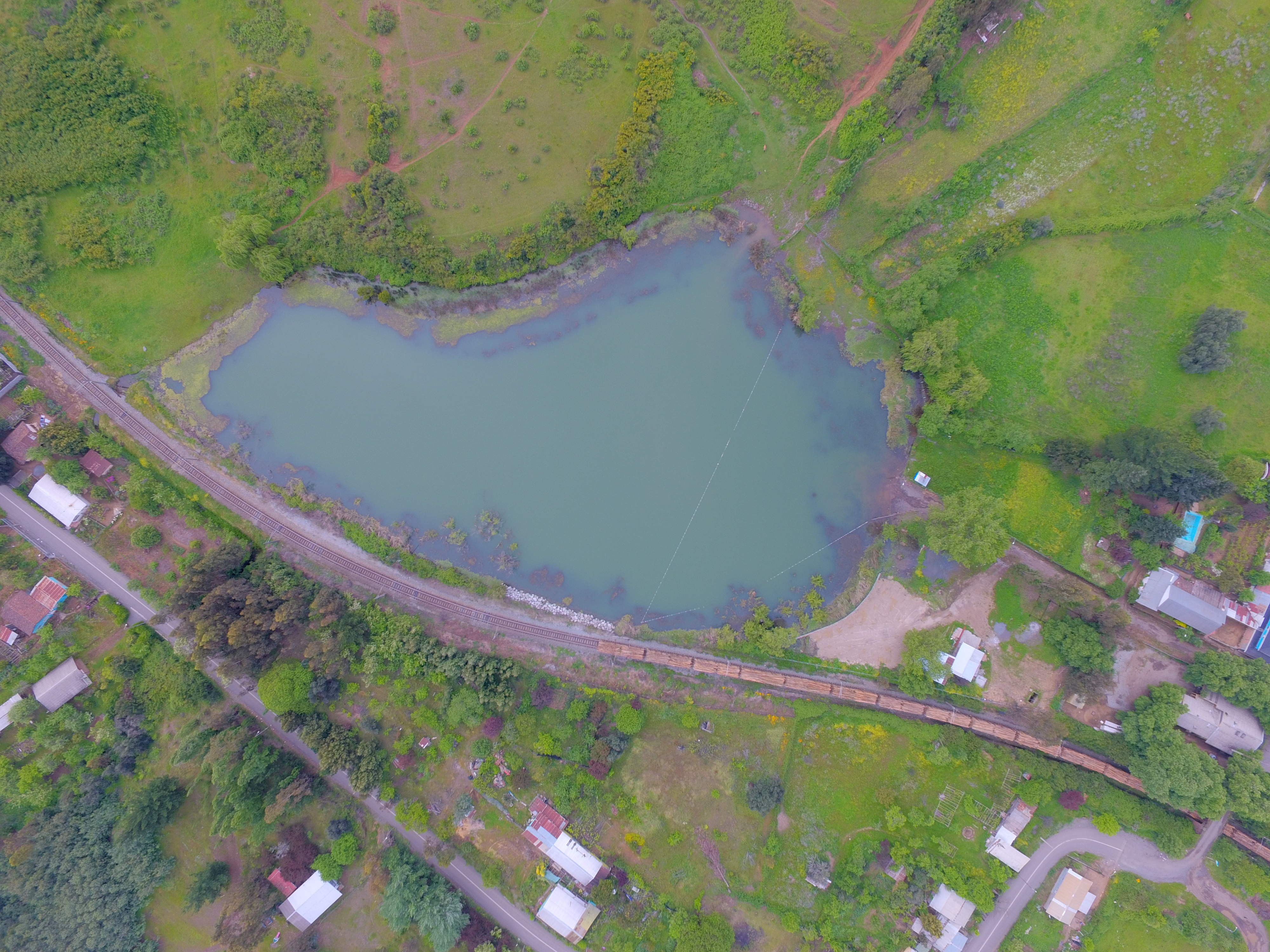 Fotografía desde el aire de la laguna de Talcamávida